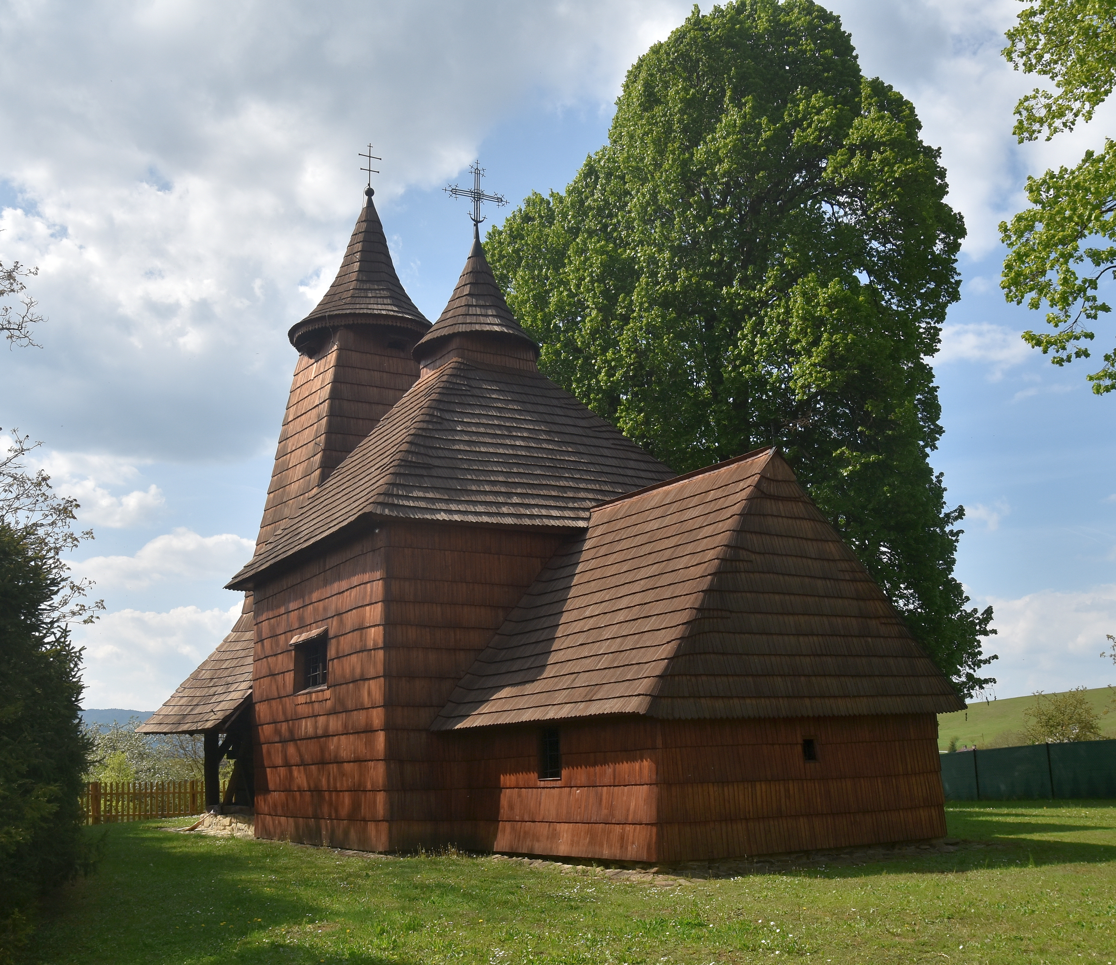 gr.k.sv.Lukáša; Drevený kostolík